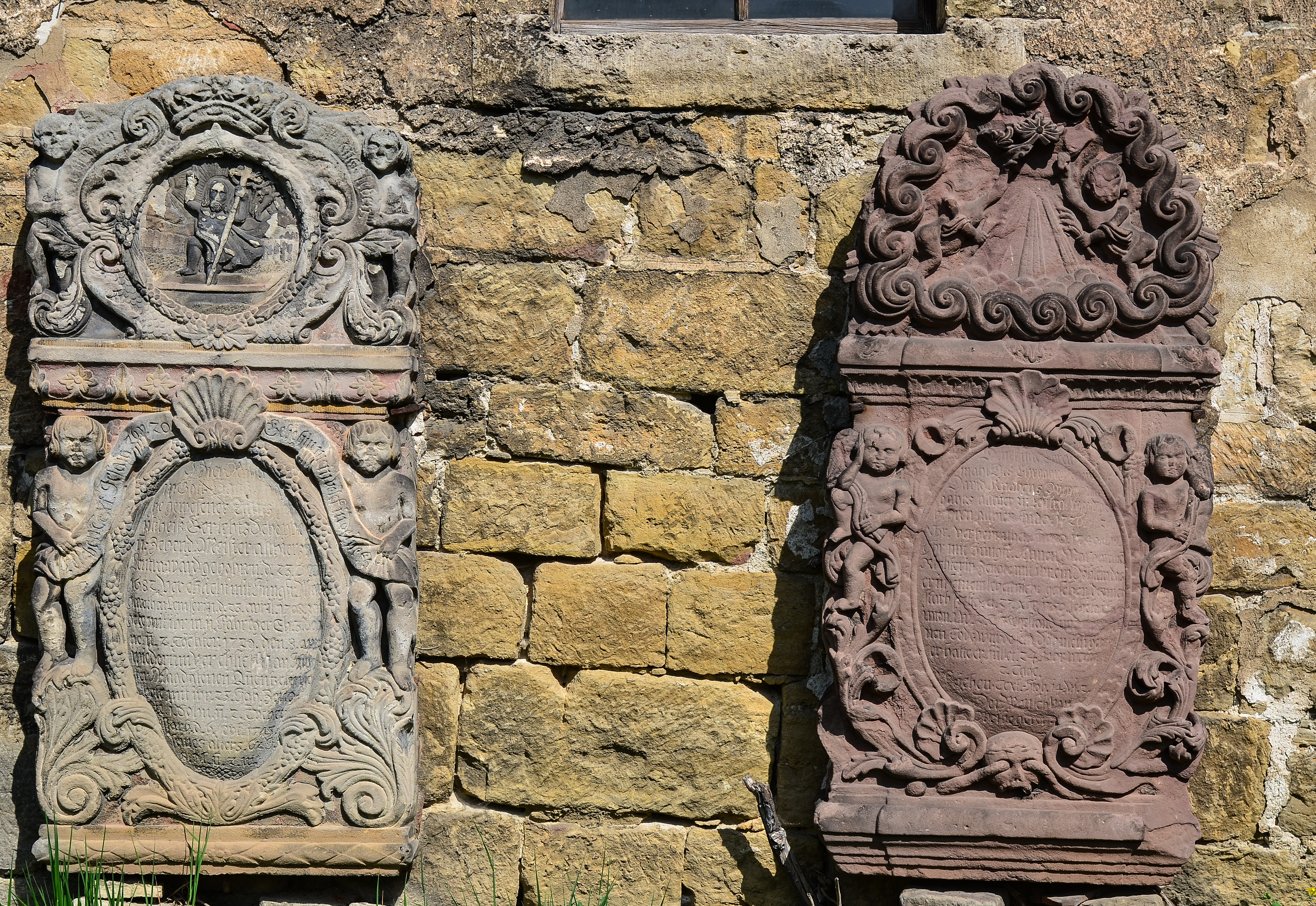 Leutra St.Nikolauskirche Grabsteine